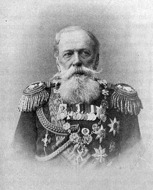 генерал О. Б. Рихтер